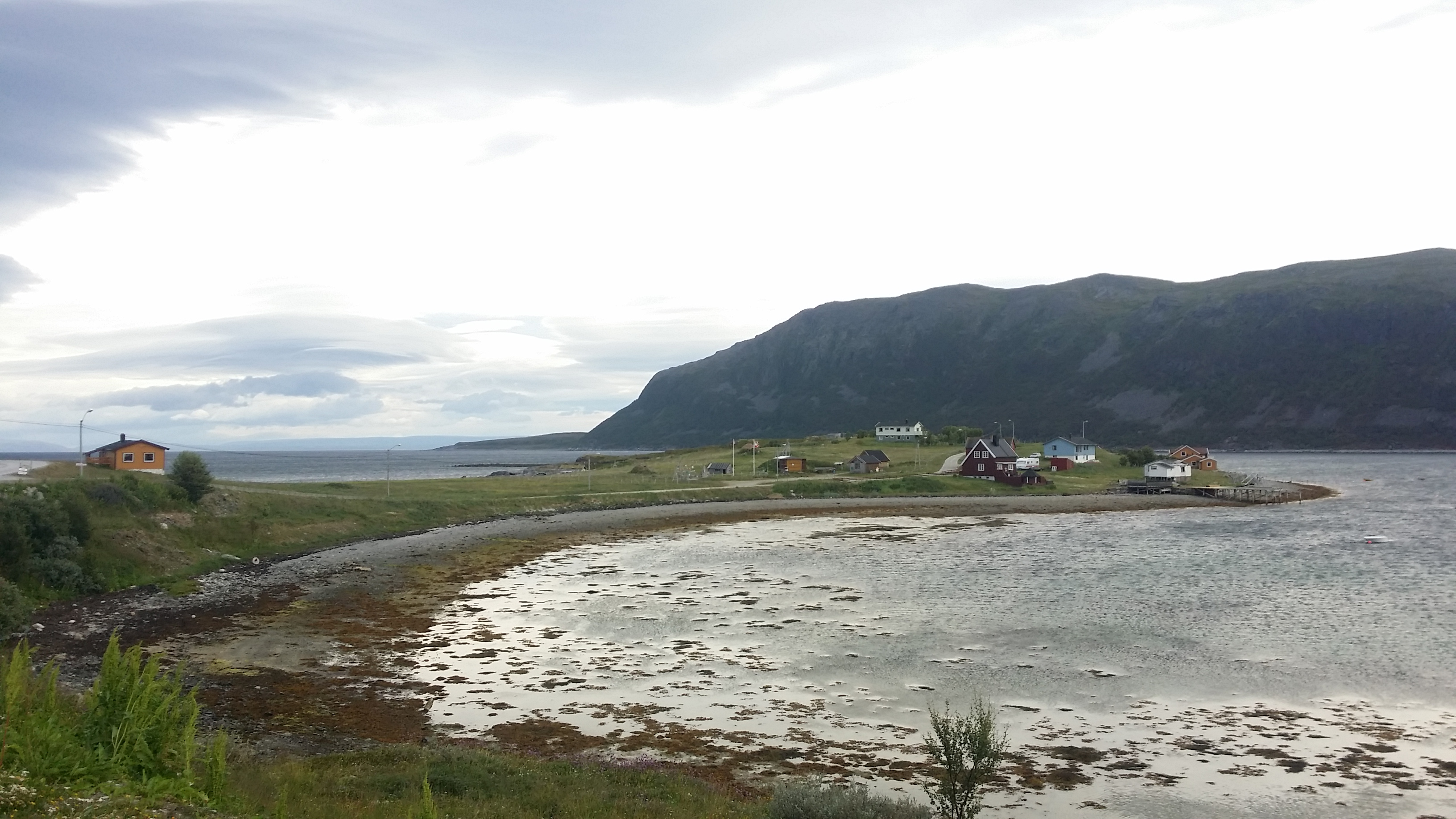 Guoskatnjárga in Porsanger, Norway